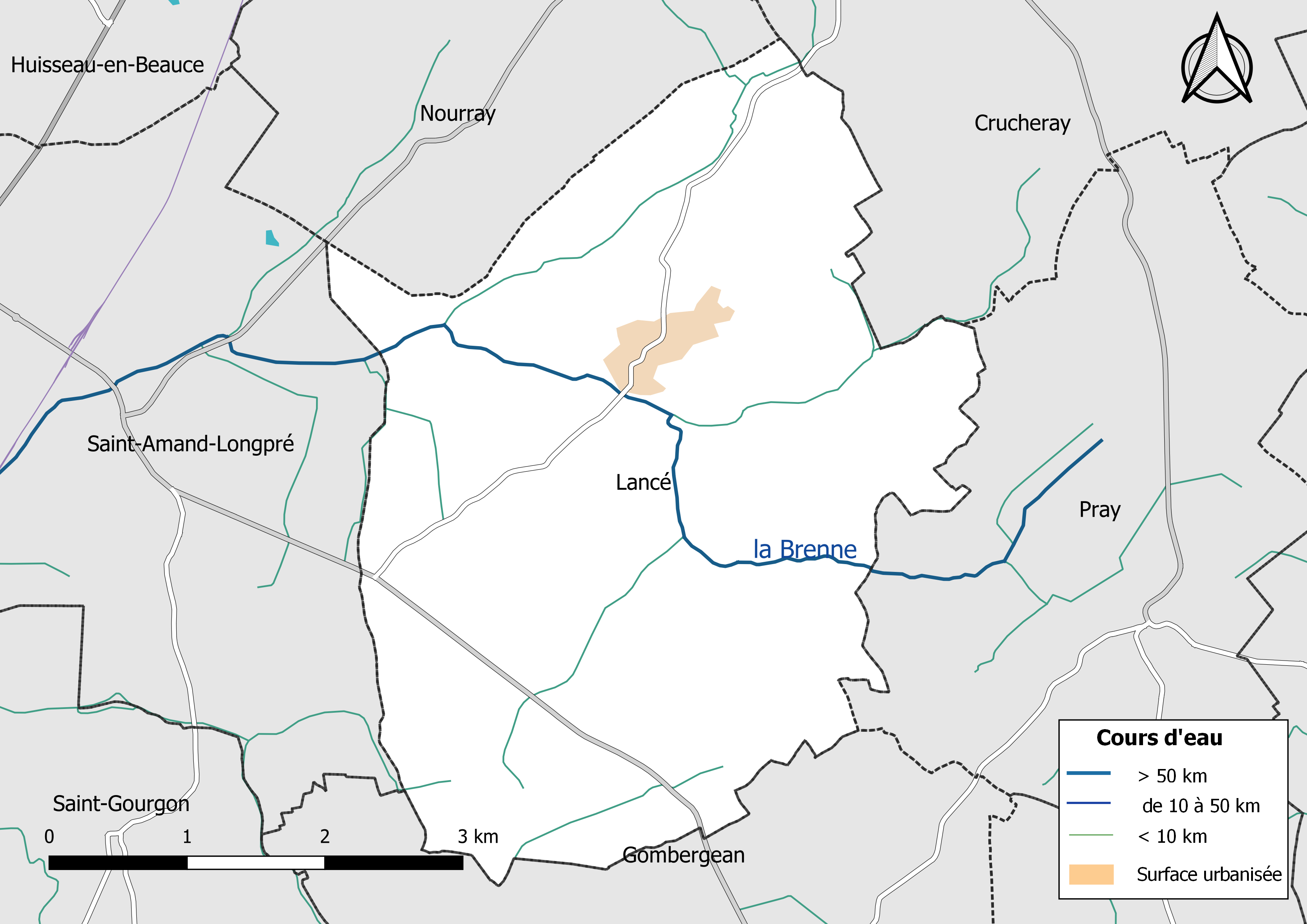 Carte du réseau hydrographique de la commune de Lancé (France).